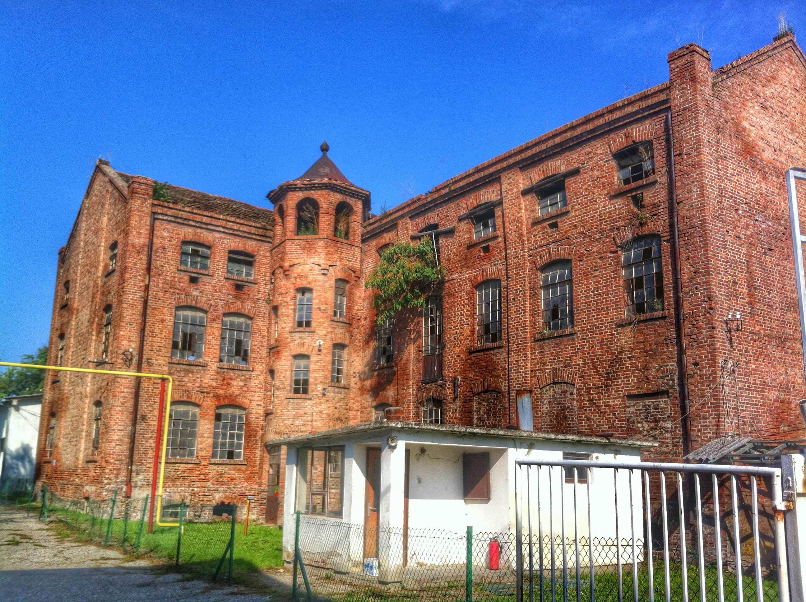 Српски (ћирилица): Зграда је део некадашњег комплекса привредно-индустријских објеката које су у периоду 1886-1928.године подигли немачки индустријалци Кристијан Шојс и Вилхелм Шумахер.